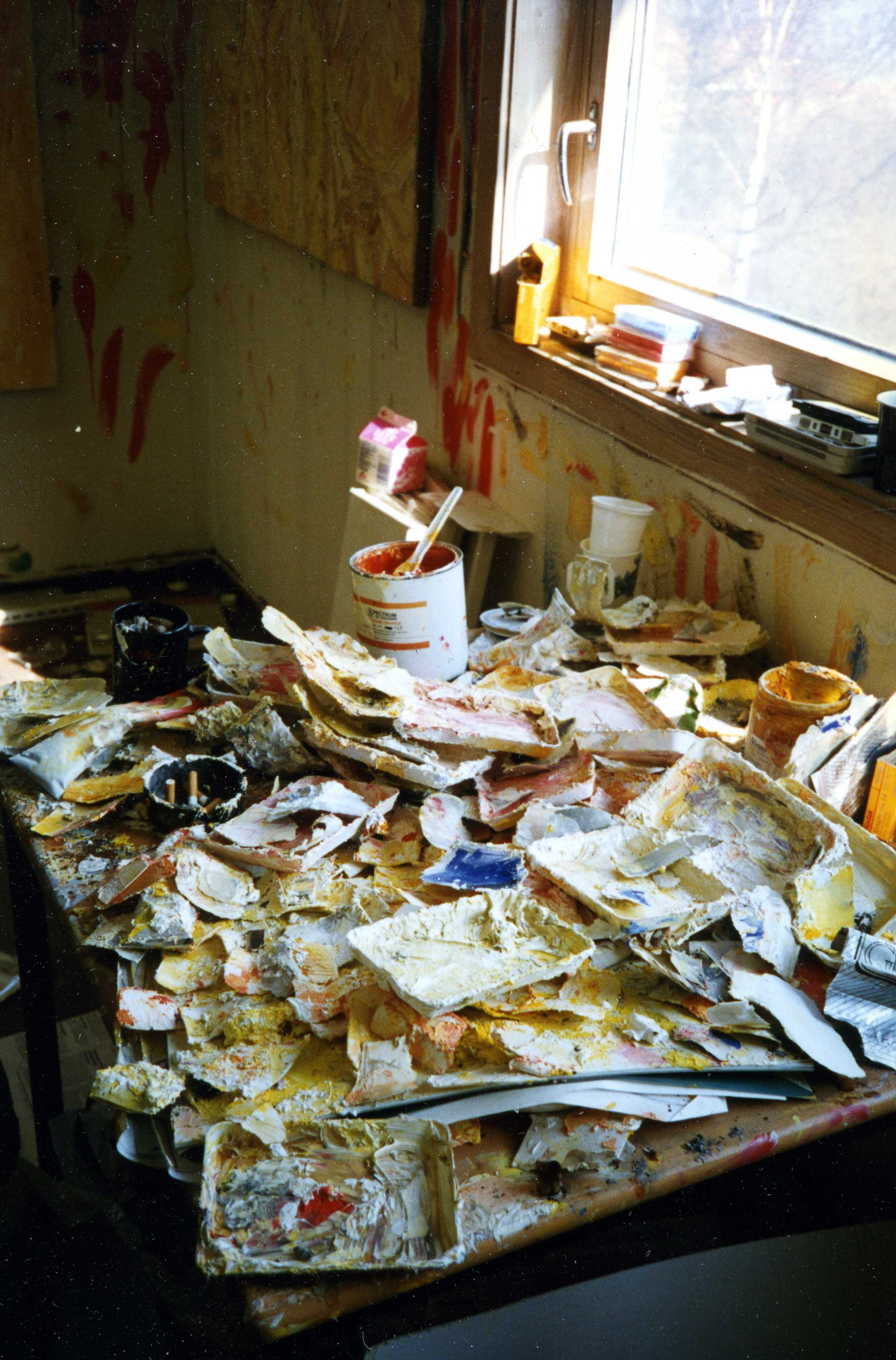 Table de travail dans l'atelier du peintre norvégien Kjell Pahr-Iversen.